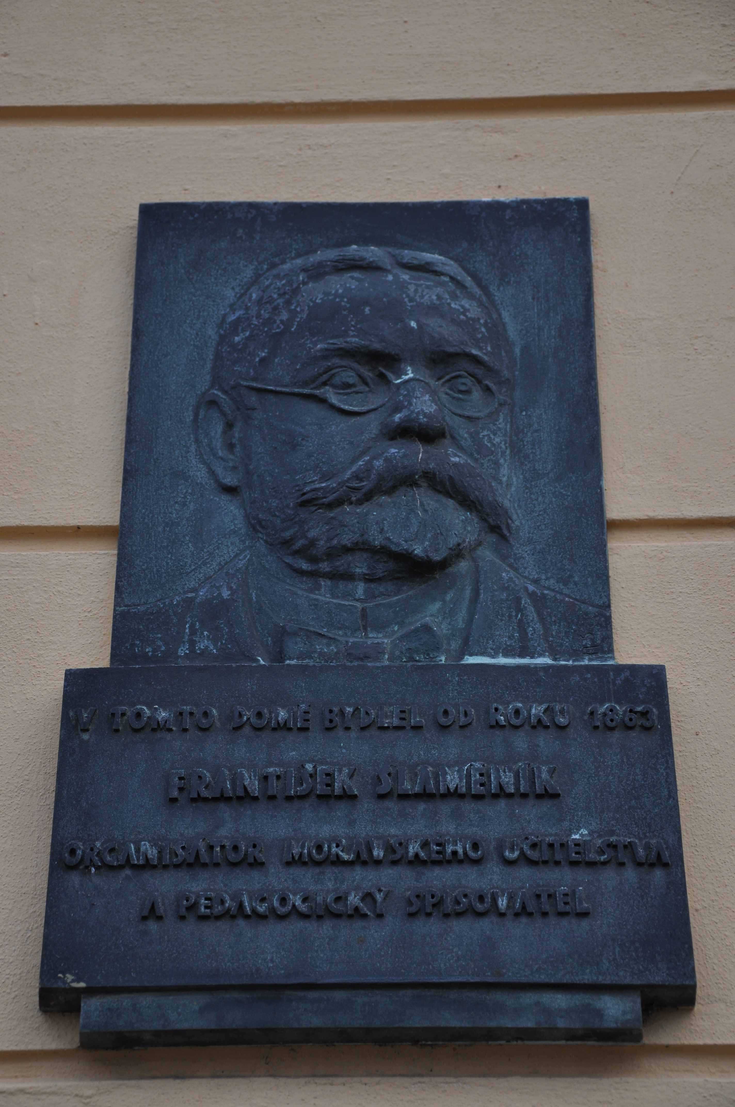 Pamětní deska Františka Slaměníka od Sylvestra Harny